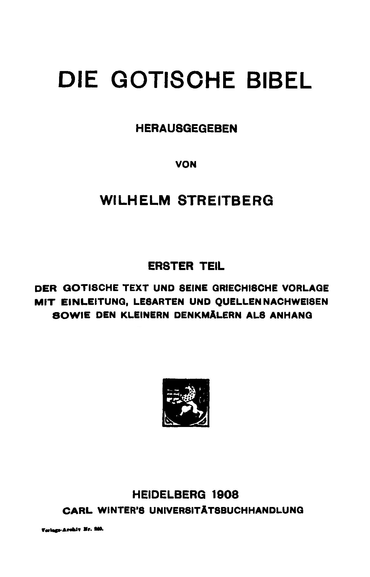 the first page of the Streitberg's "Die Gotische Bibel"